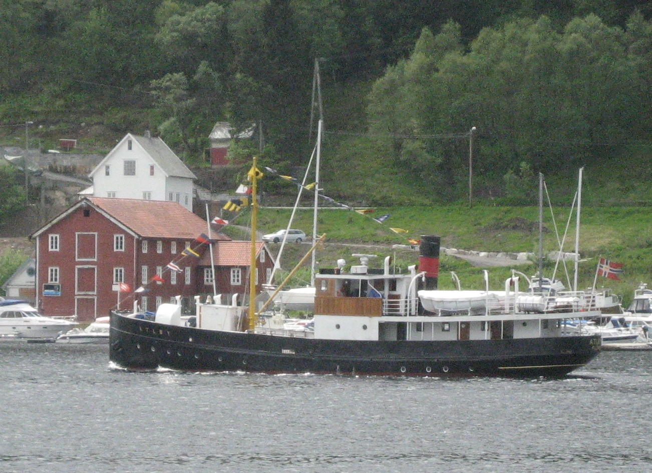 MS Atløy